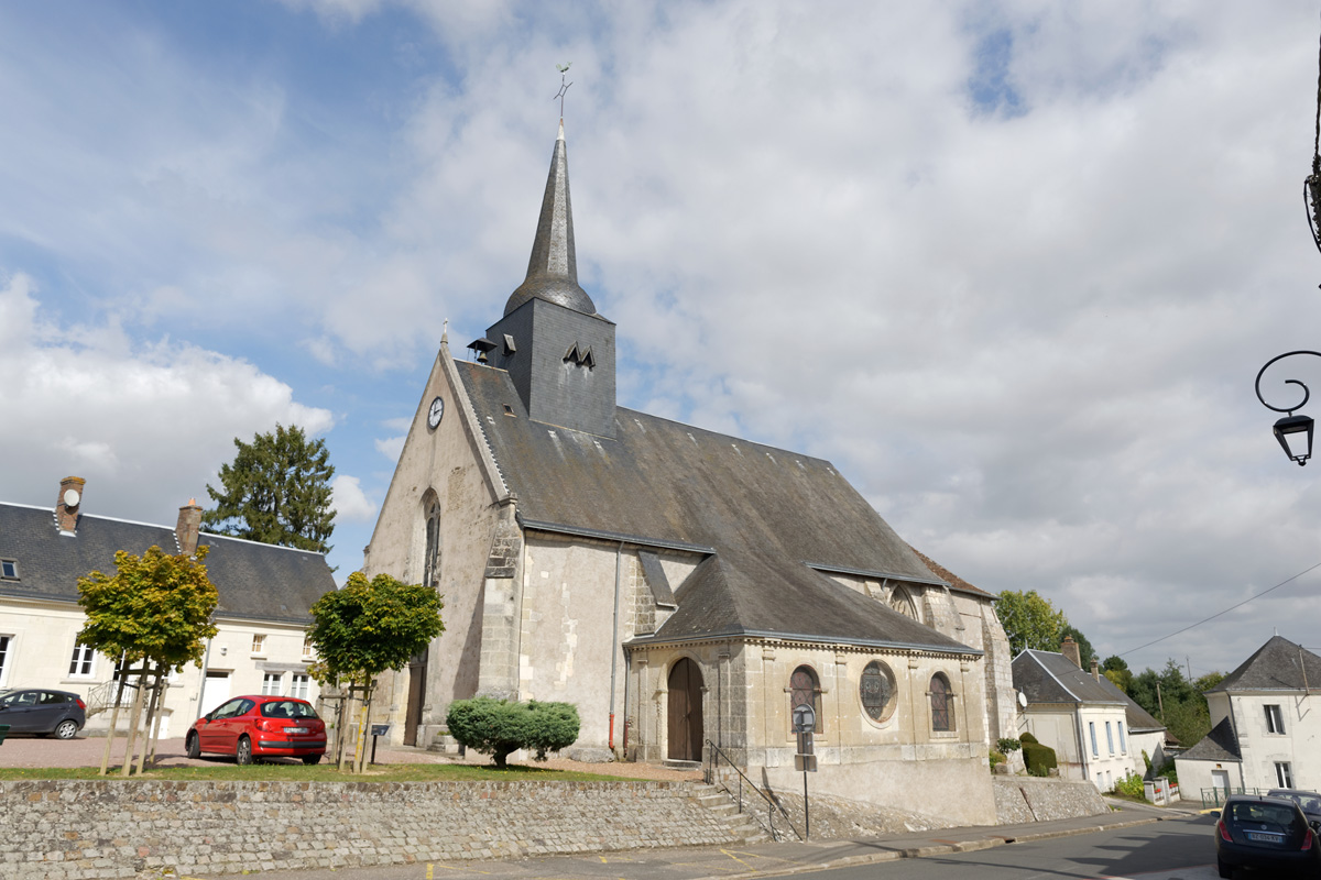 Église Saint-Jean-Baptiste de Prunay-Cassereau .